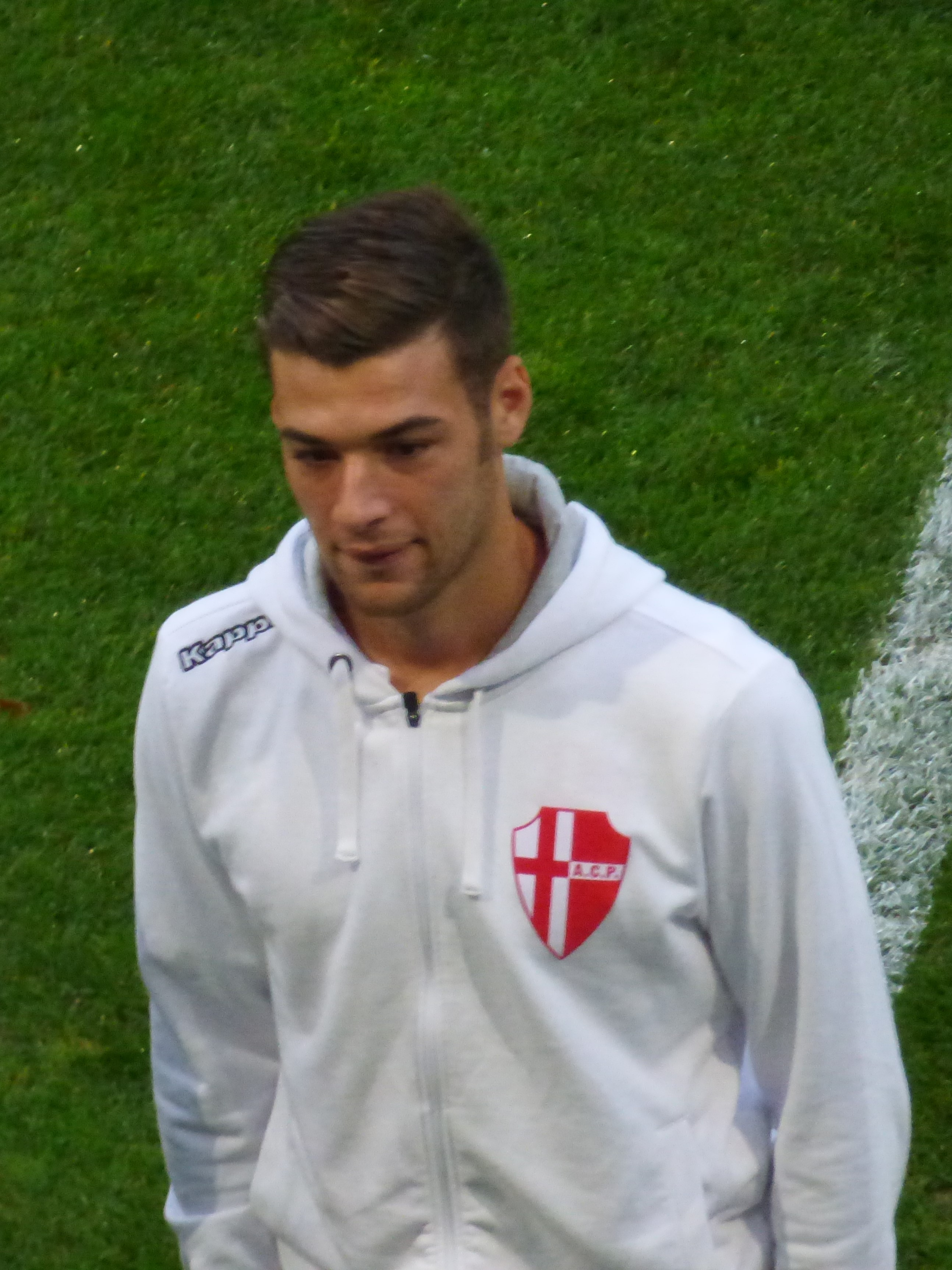 Alessandro Vogliacco lors du match amical RC Lens - Calcio Padova, le 11 octobre 2018 au Stade Bollaert-Delelis de Lens.